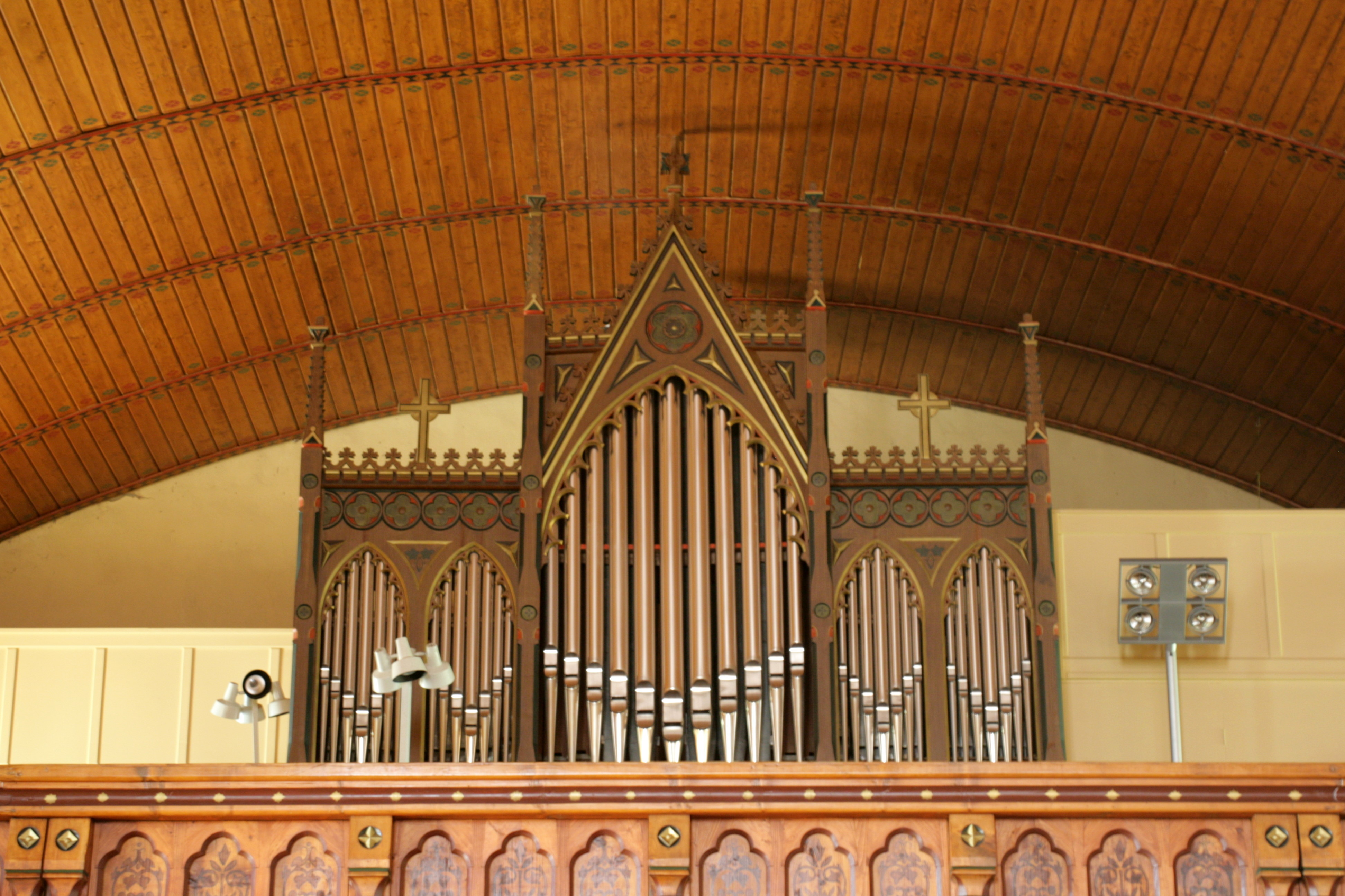 St. Michaelis an der Hauptstraße in Gerdau